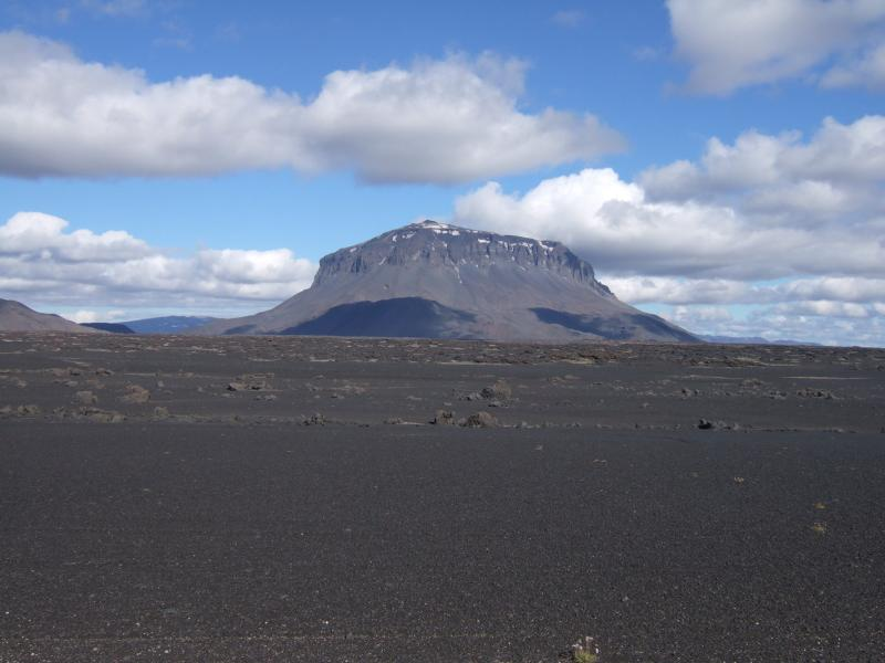 Herðubreið